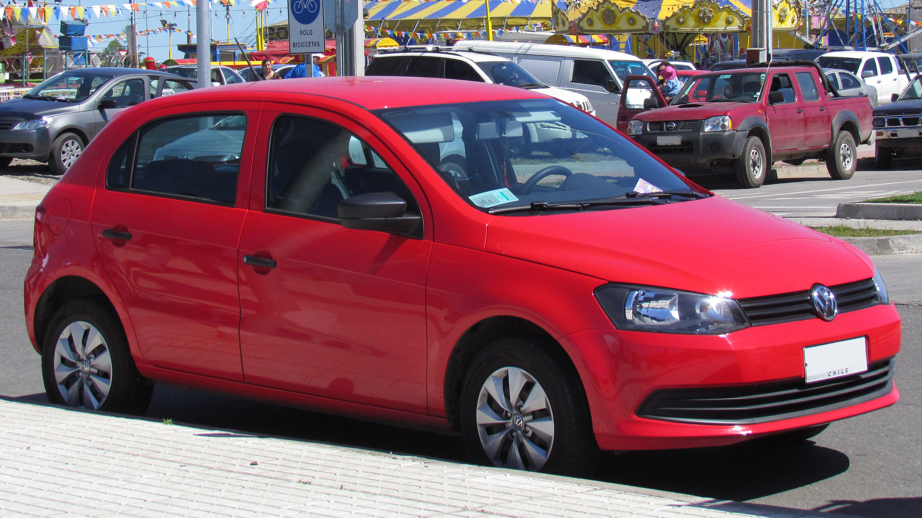 ChiLe, Concepcion